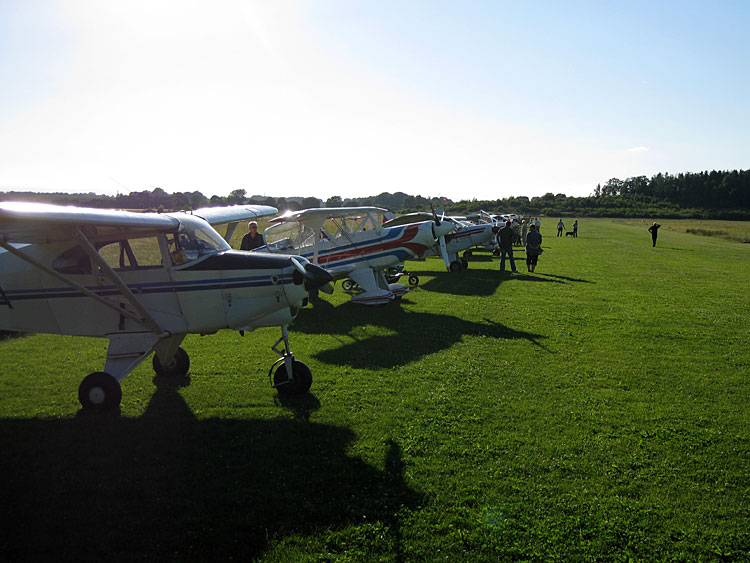 Besökare på VåffelFlyIn, Hässleholms Flygklubb, Bokeberg, sommaren 2008